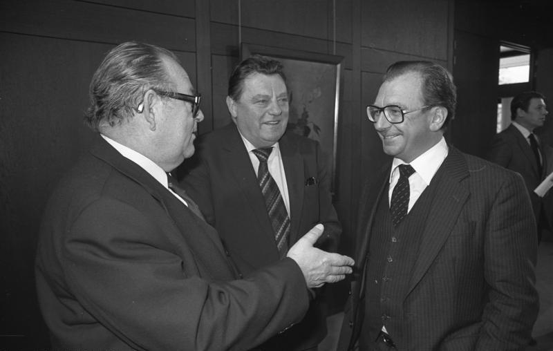 Bundeskanzler Helmut Schmidt empfängt die Ministerpräsidenten der Länder im Bundeskanzler Amt.